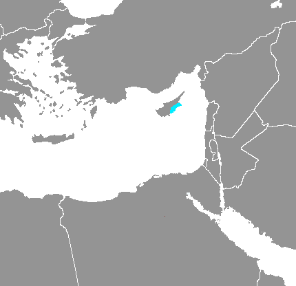 Árabe chipriota